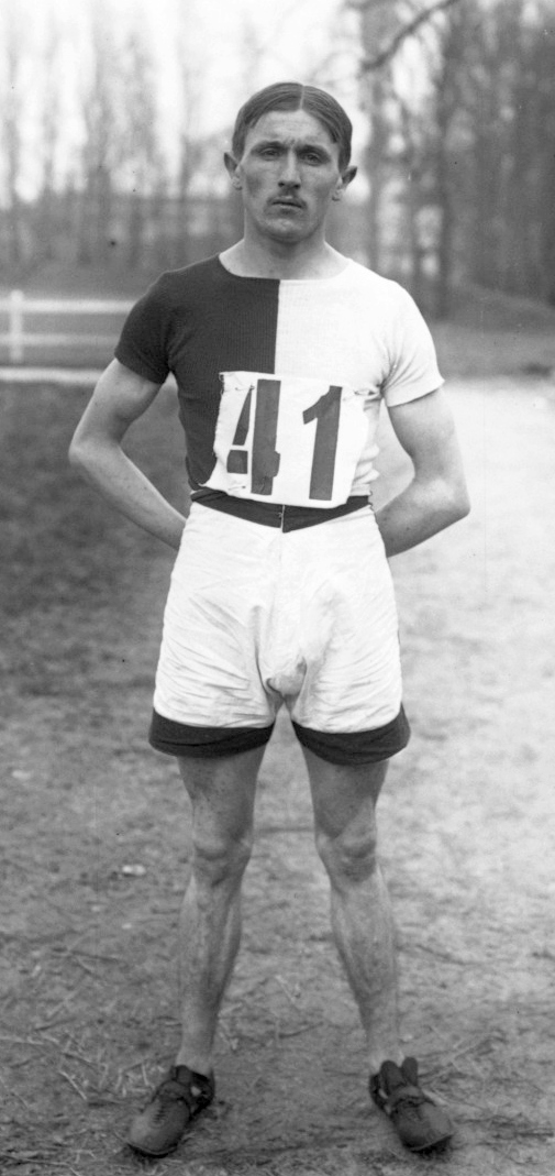 [2-3-13, cross national à Langon près de Bordeaux] G. Lauvaux de Châlons [portrait du coureur] : [photographie de presse] / [Agence Rol]